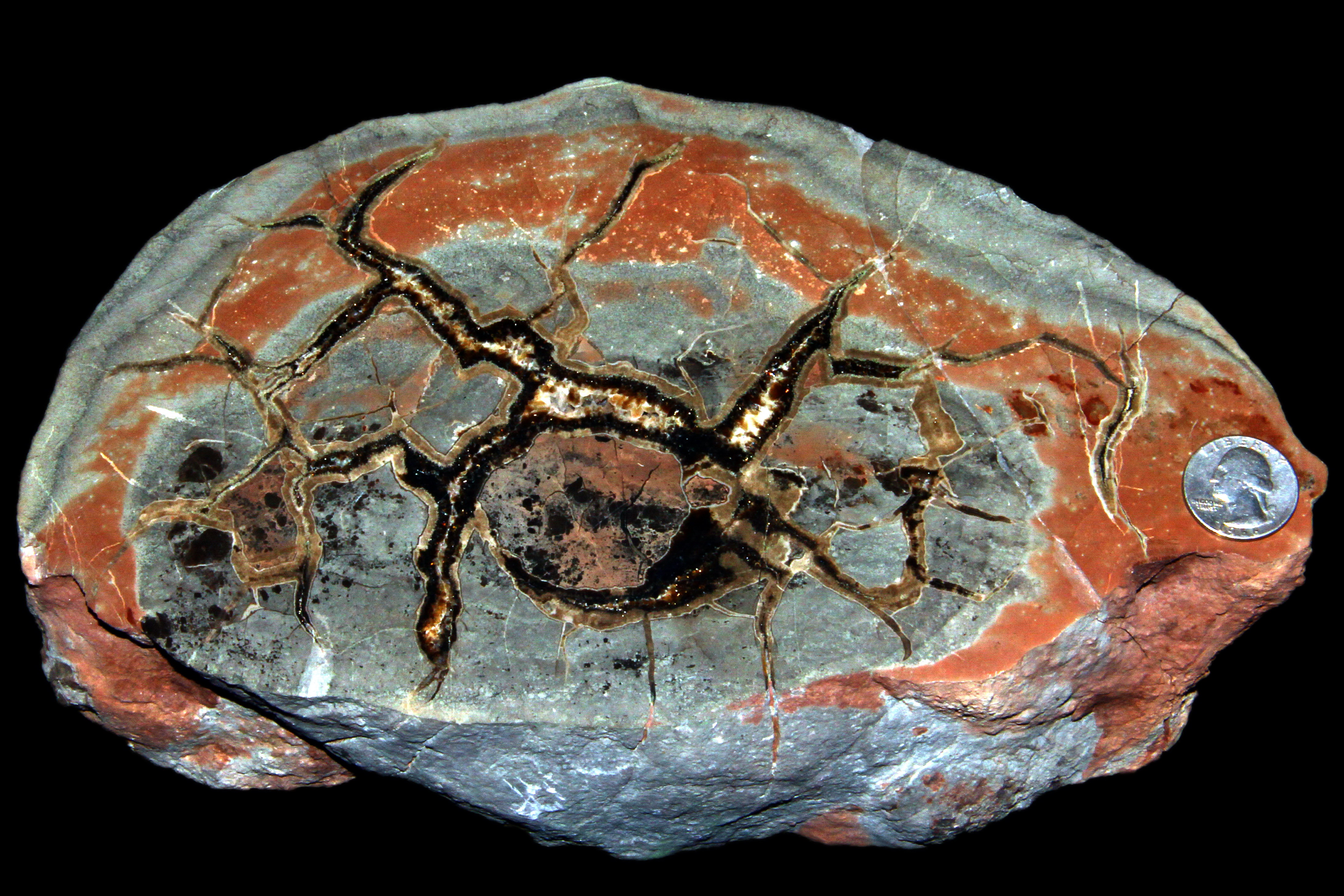 Septaria - Okolice Nowego Kościoła. Polska.